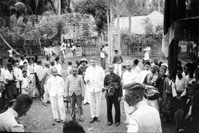 Negatief. Plaatselijke hoofden vieren in galakostuum de inhuldiging van de zelfbestuurder van Tapalang, Zuid-Celebes